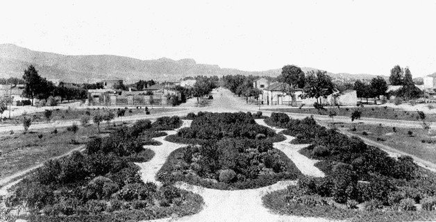 صورة لمدينة بركان عاصمة بني يزناسن في أواسط القرن العشرين